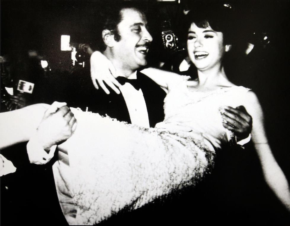 I cantanti Domenico Modugno e Gigliola Cinquetti, vincitori del Festival di Sanremo 1966 con la canzone Dio, come ti amo.